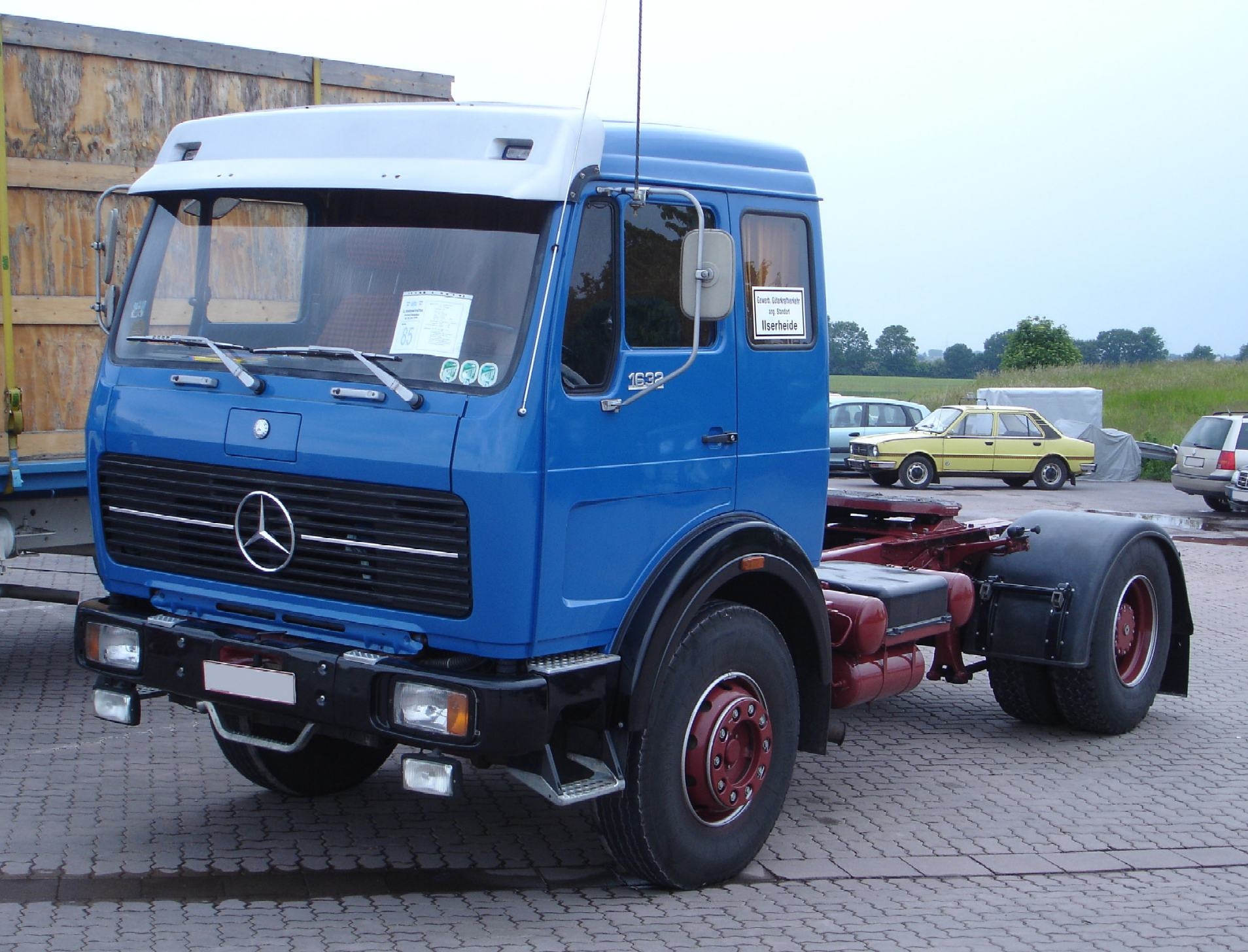 Mercedes-Benz NG 1632 Sattelschlepper